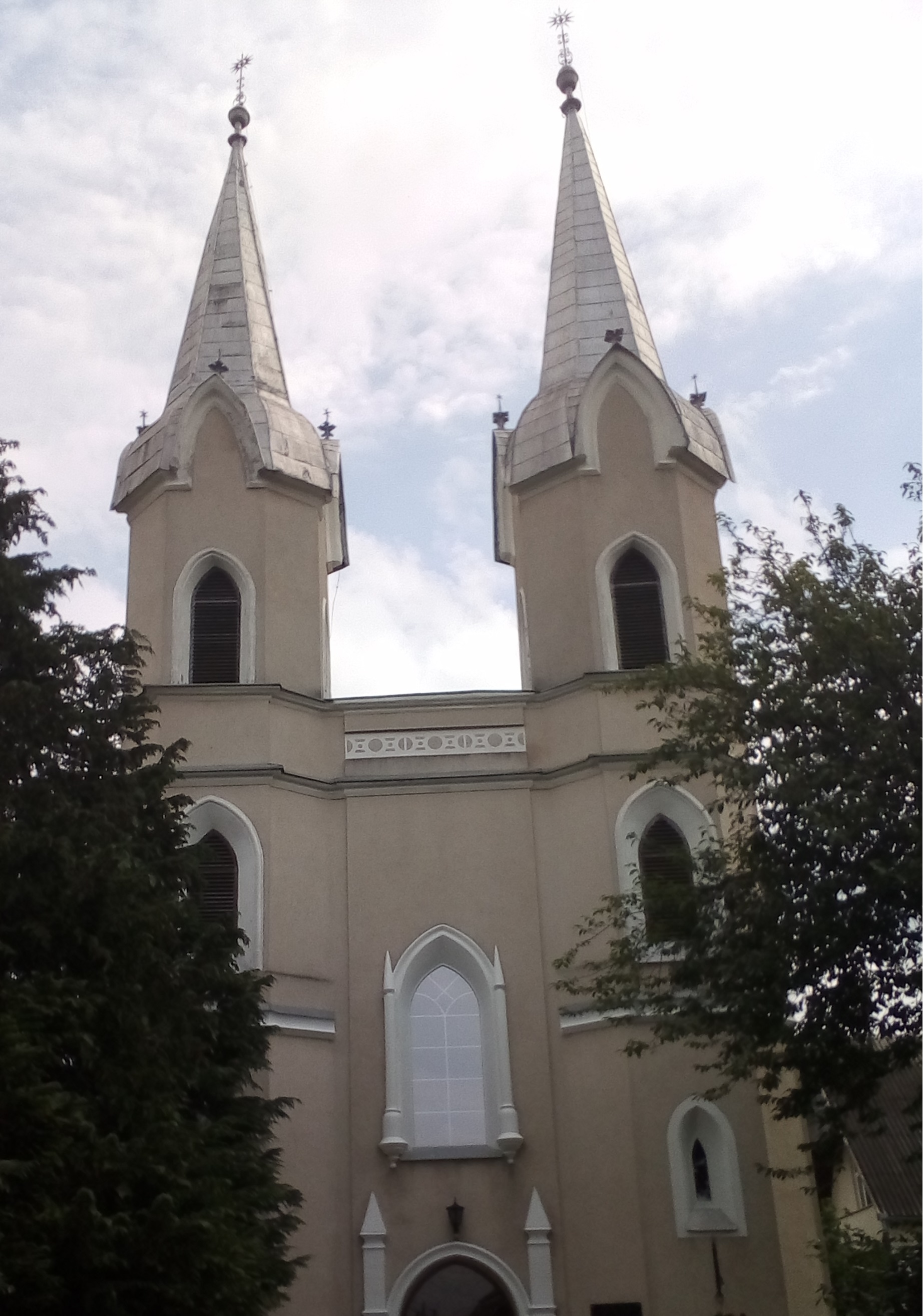 Храм має дві вежі, просторе подвіря, двоскатний дах.